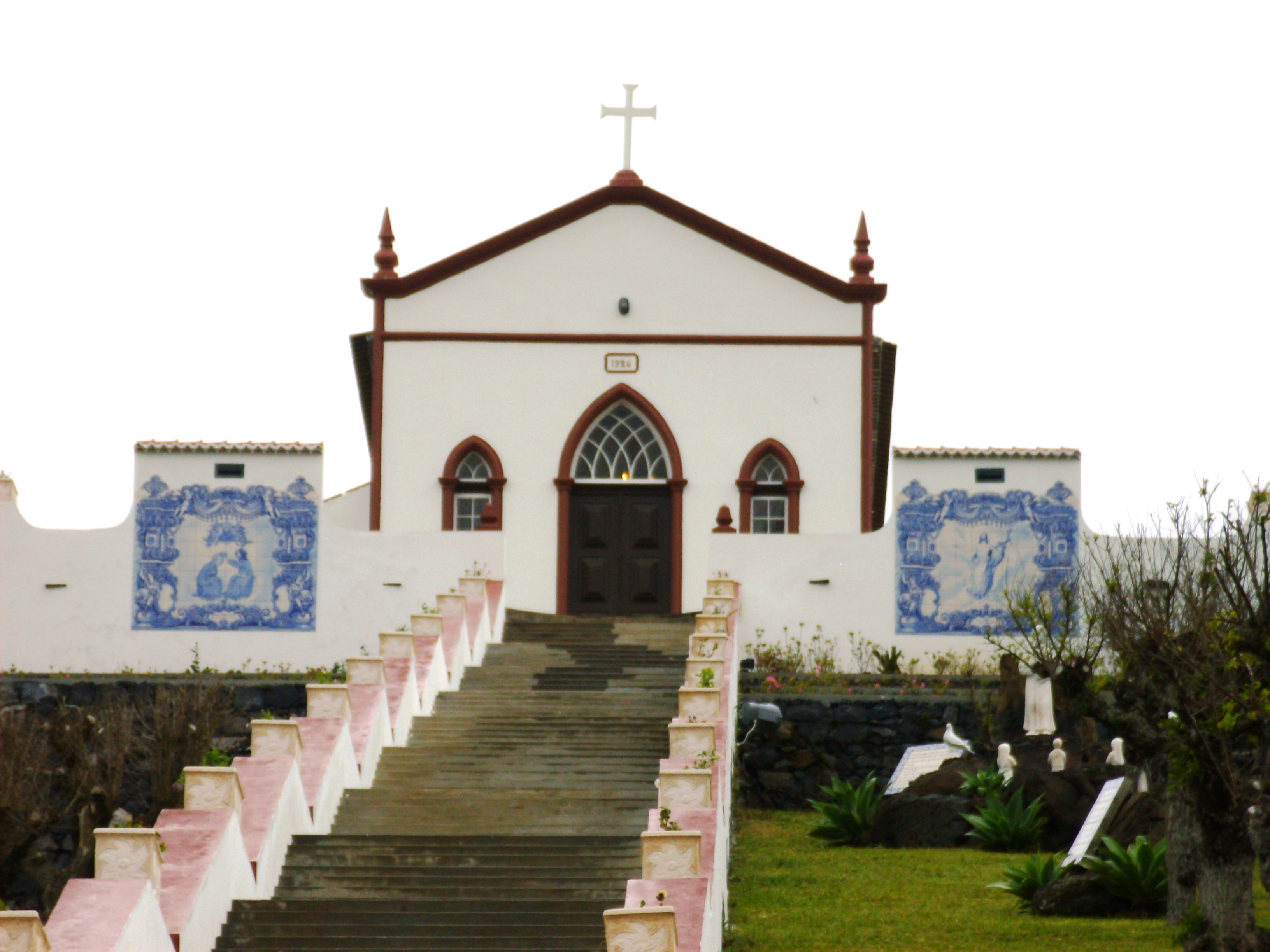 Ermida de Nossa Senhora de Fátima, Ilha de Santa Maria (Açores), Portugal